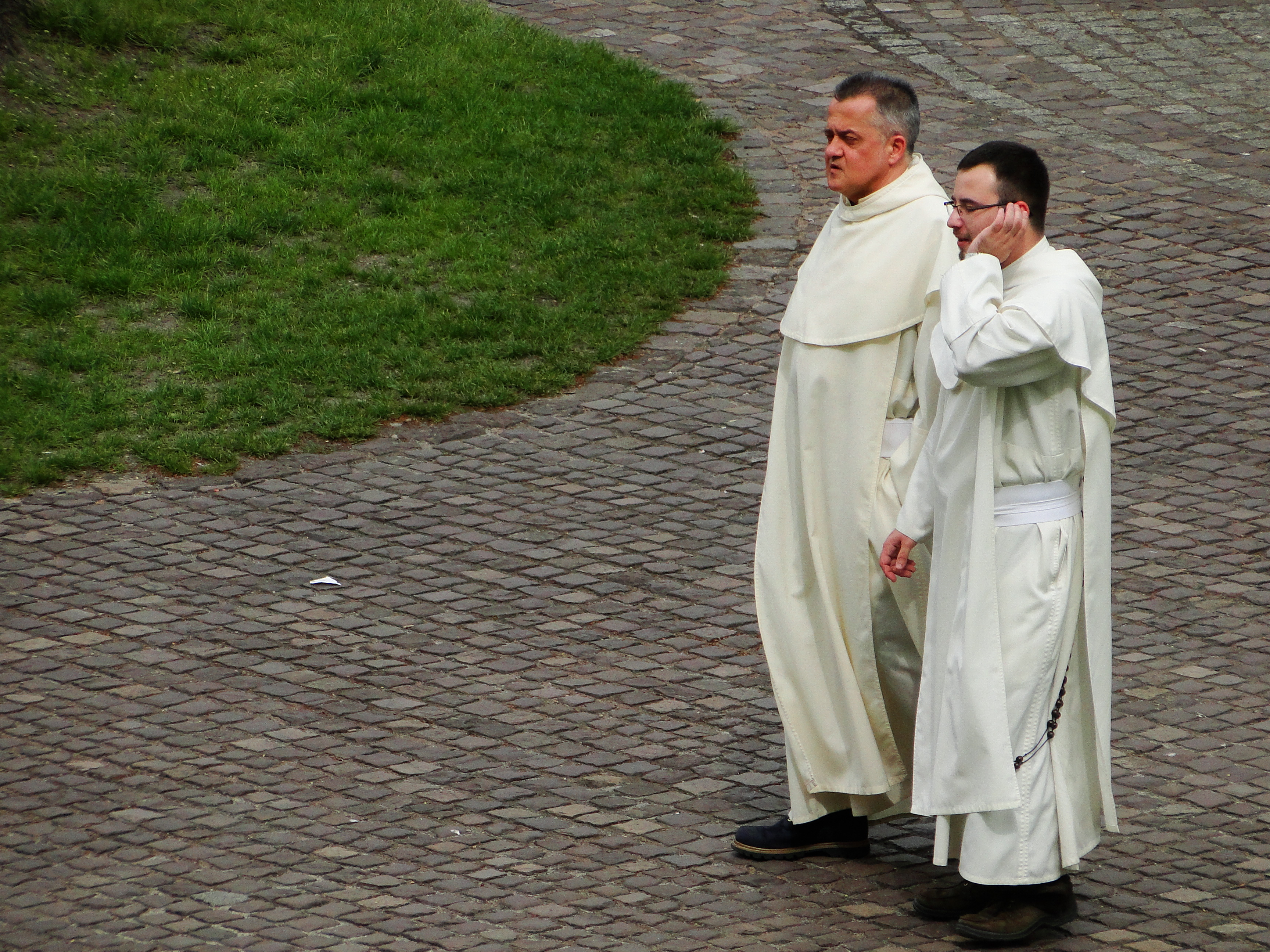 Paulini na terenie klasztoru na Skałce